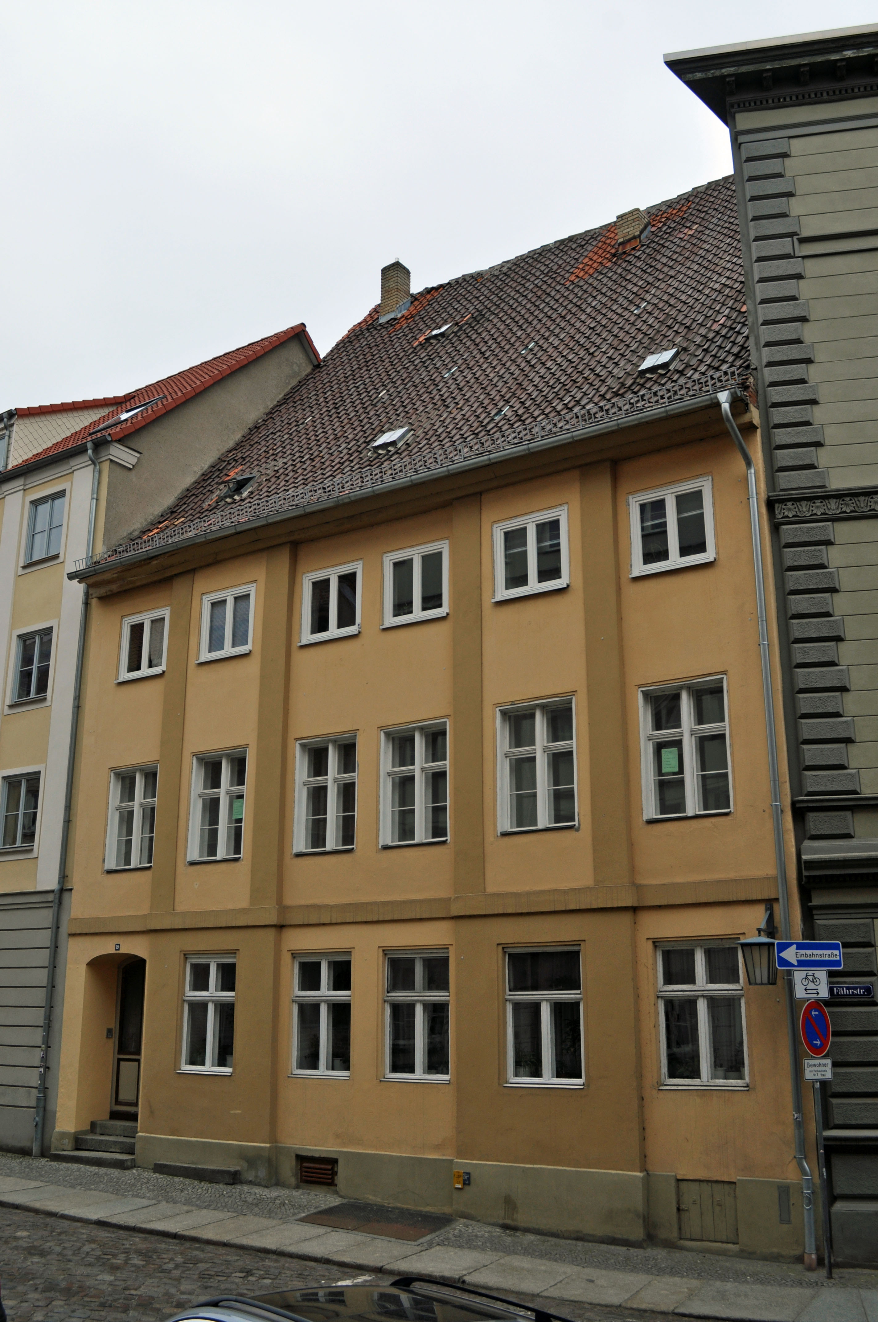 Gebäude bzw. Gebäudedetail in Stralsund. Straße und Hausnummer siehe Dateiname.